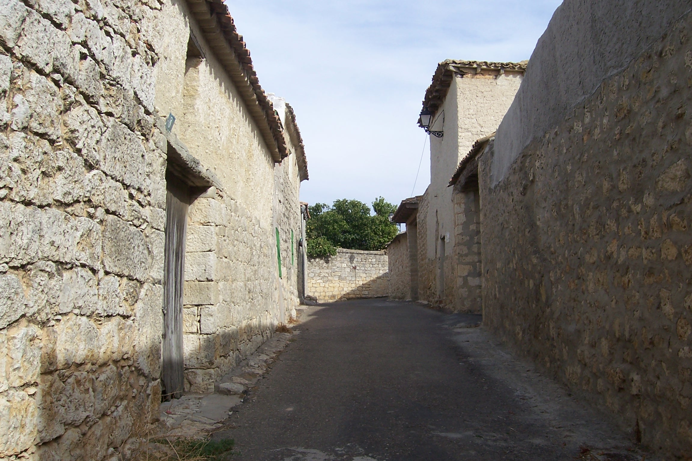 Villalba de los Alcores en la provincia de Valladolid, España. Arquitectura popular.